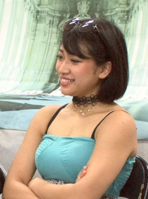 2017.7.4 スターダム記者会見